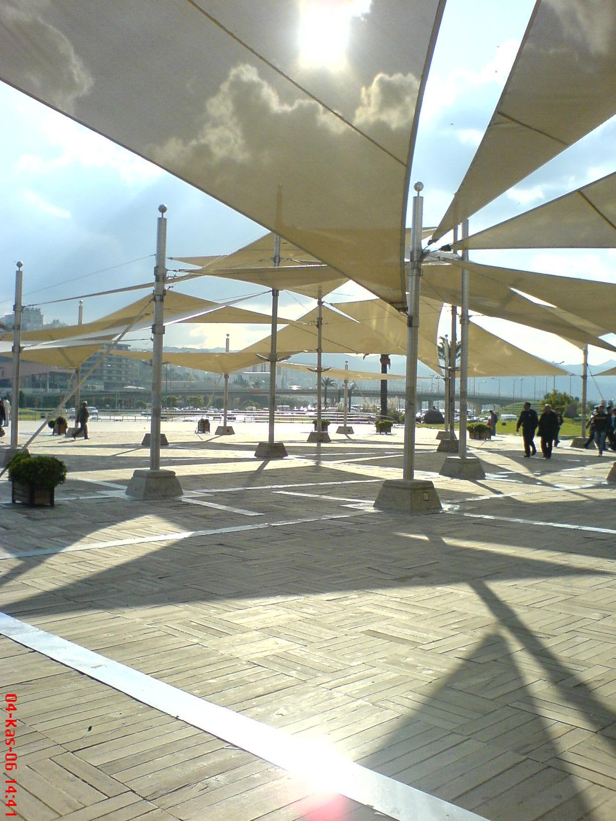 Konak Üstgeçit